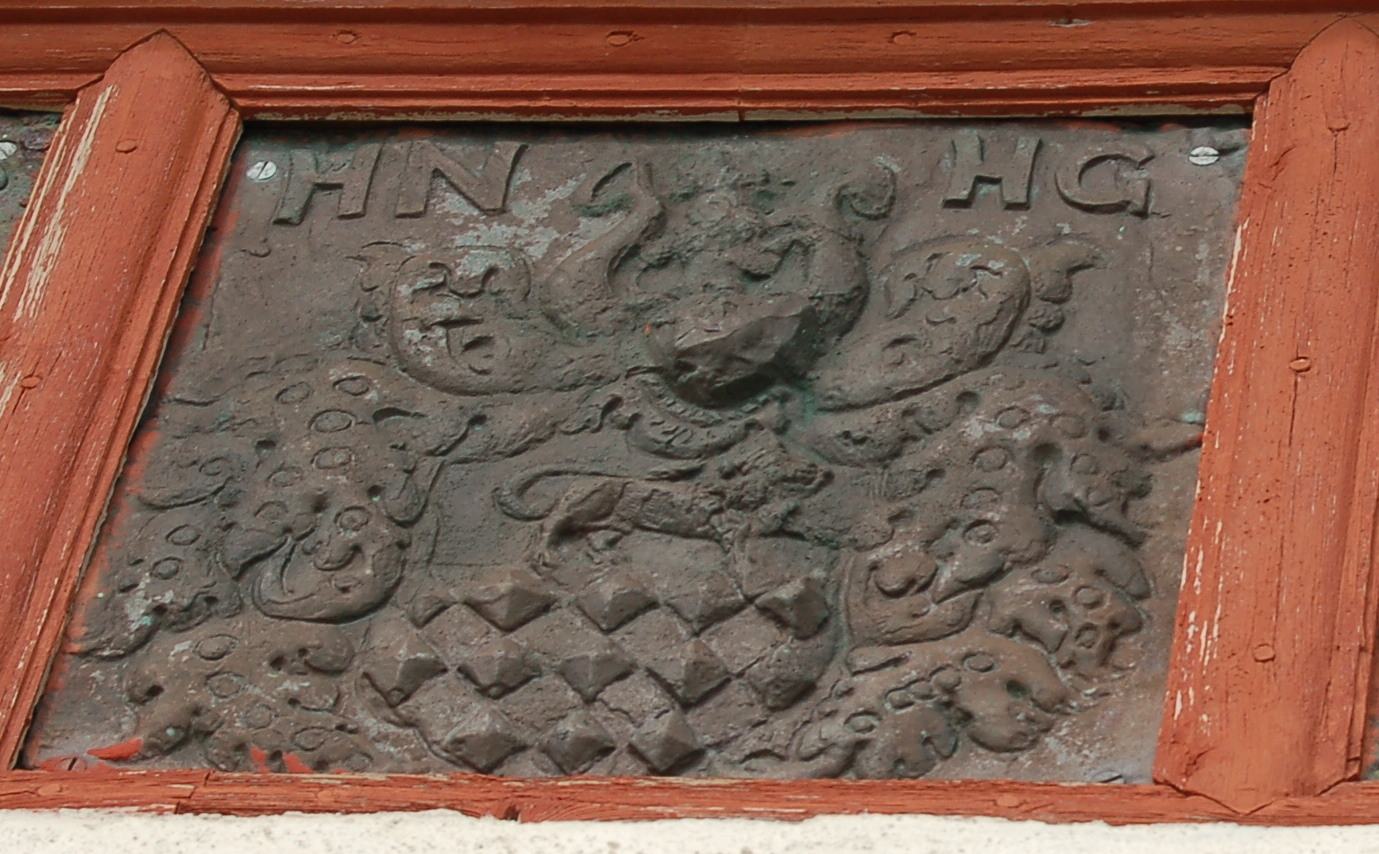 Heraldikk Austråttborgen - Gyldenløve